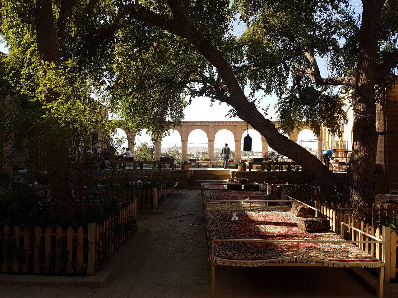 خانه مستوفی شوشتر - ۱۳۹۶